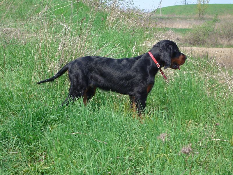 Young Gordon Setter